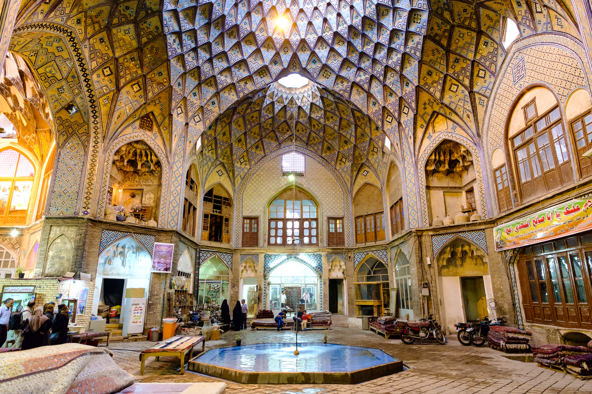 Puits de lumière du Timche-ye Amin od-Dowleh, au bazar de Kashan.